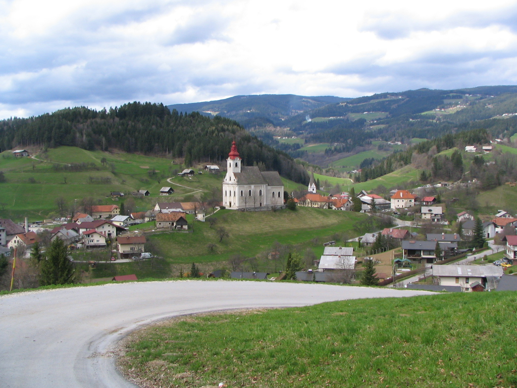 Vitanje, pogled s Štajnhofa.